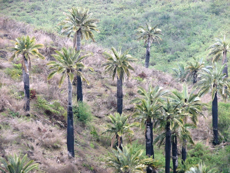 incendio forestal reciente. Santuario de la Naturaleza Palmar El Salto, Viña del Mar. Jubaea chilensis.